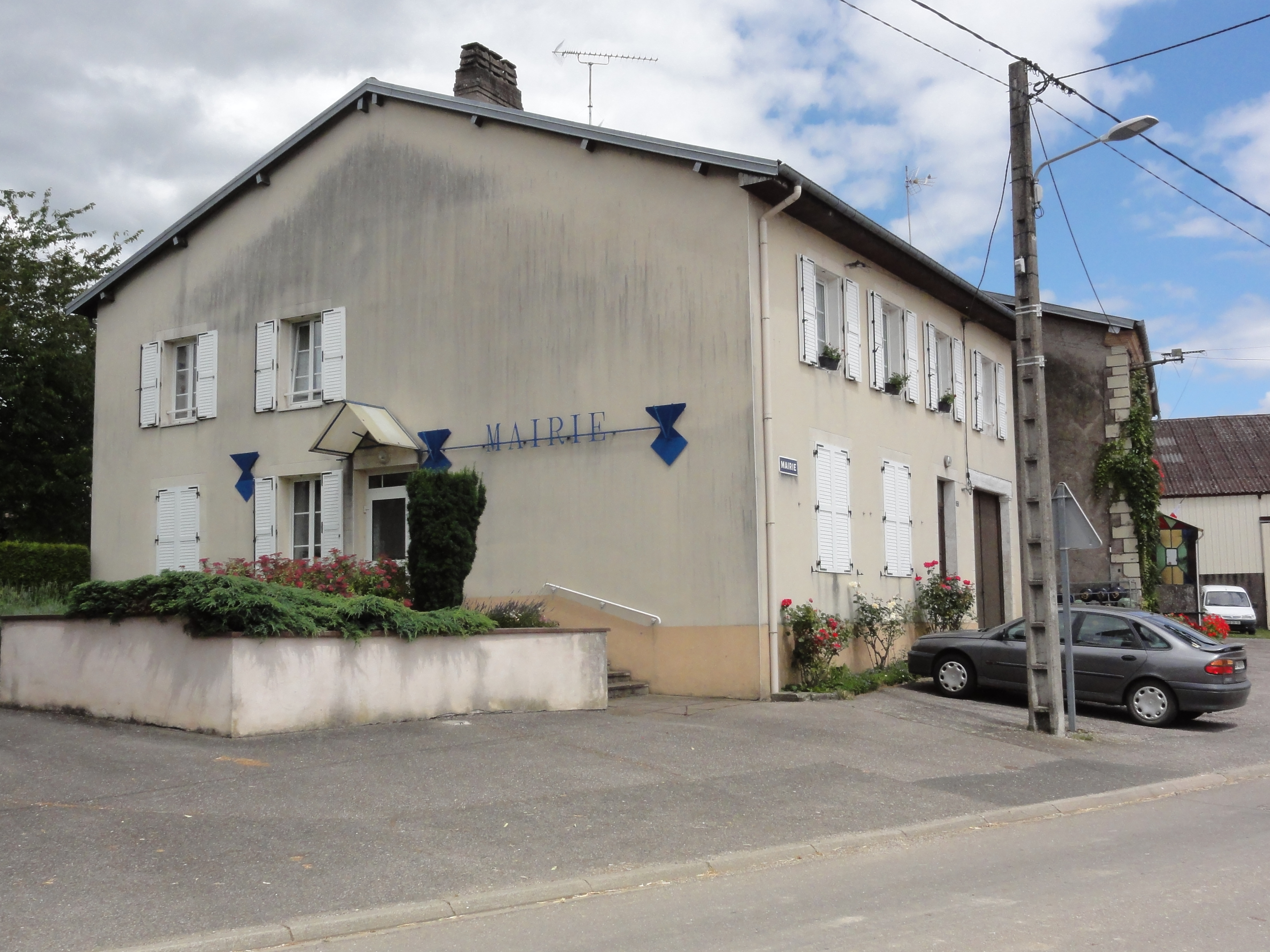 Verdenal (M-et-M) mairie